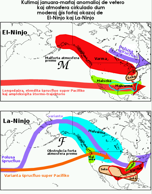 La agado de El-Ninjo sur vetero en NordAmeriko - montras atmosferan cirkuladon.